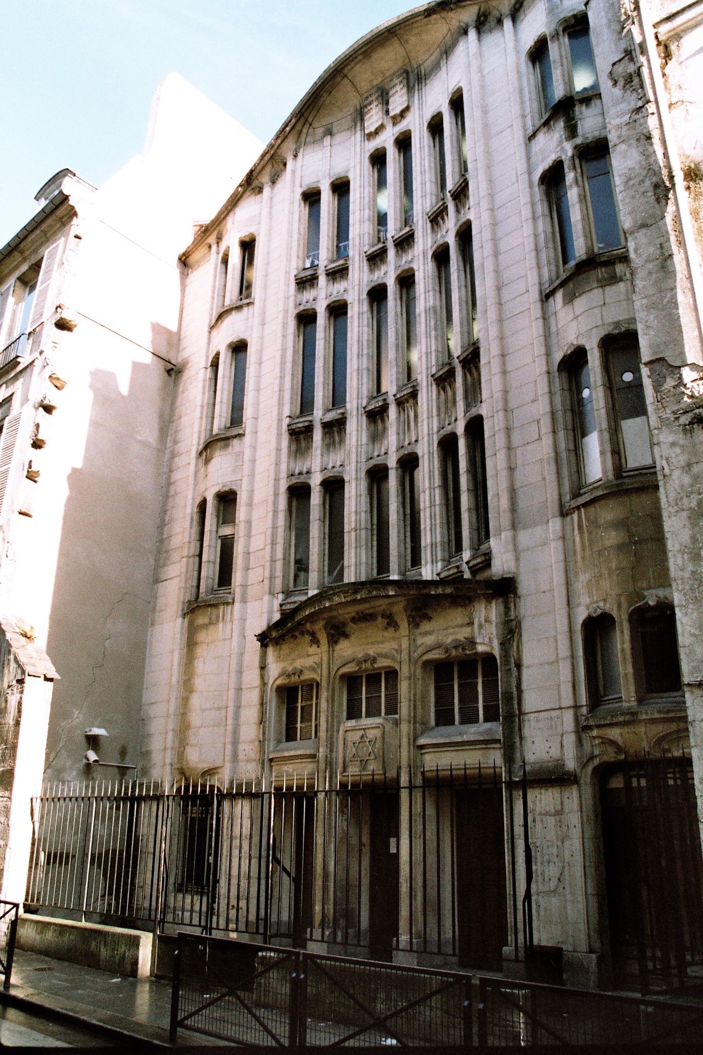 Hector Guimard's building : Art Nouveau style synagogue, (4 rue pavée, 4ème arrondissement, Paris).